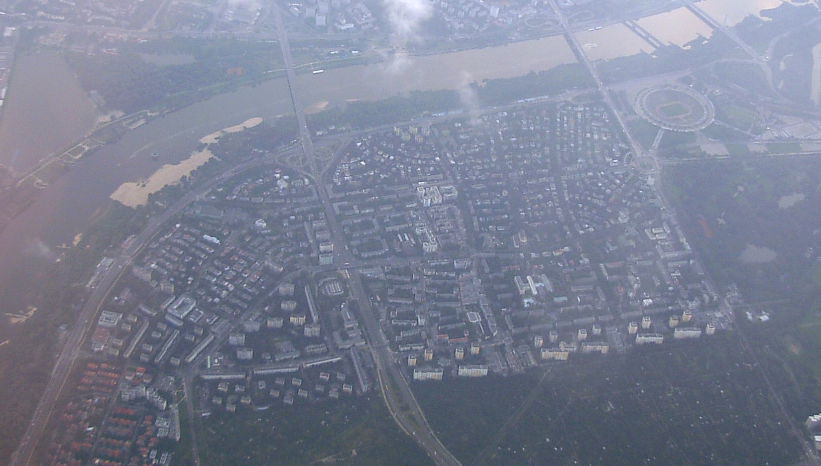 Aerial view of Saska Kępa neighbourghood in Warsaw, Poland